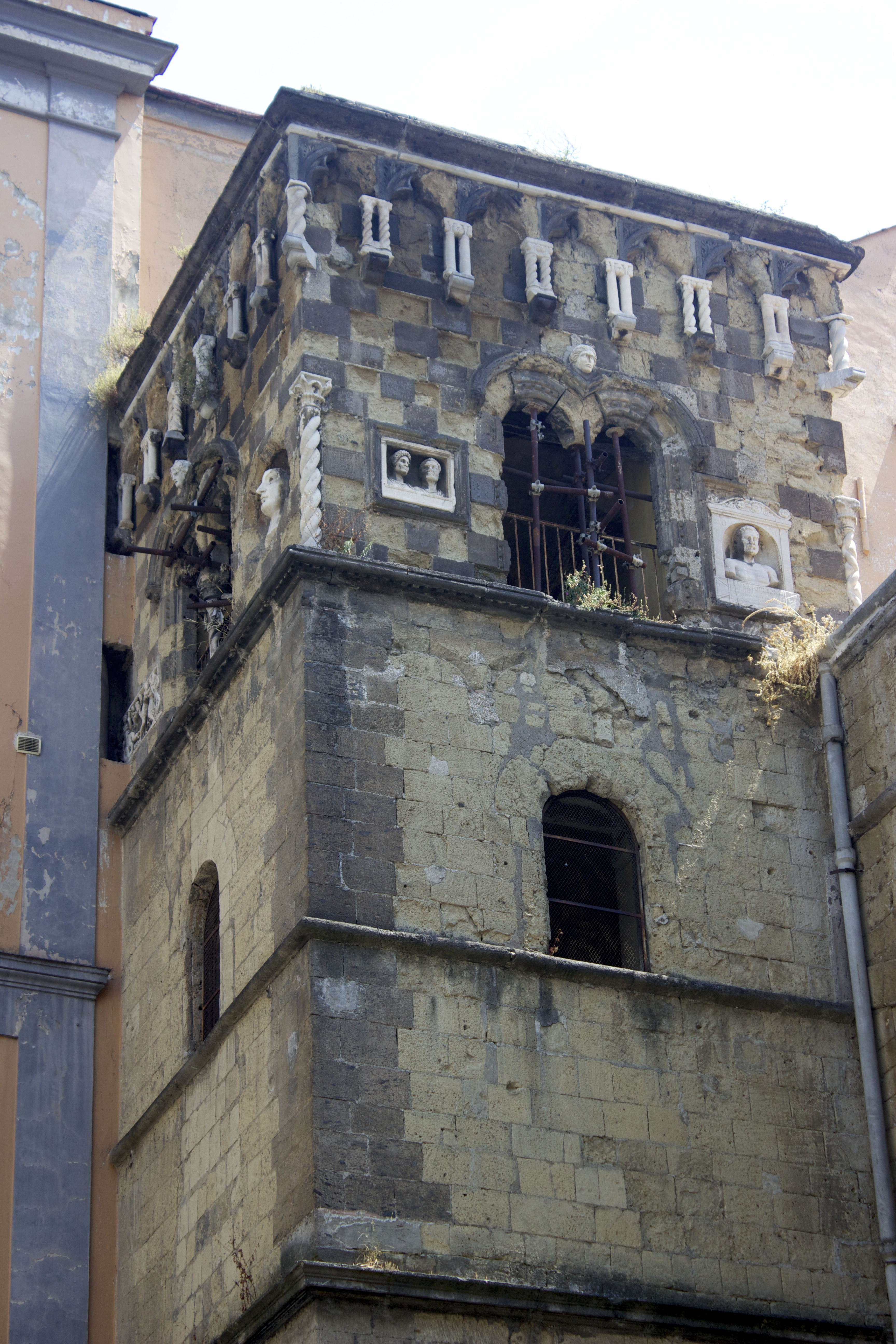 Capilla Pappacoda. Campanario.